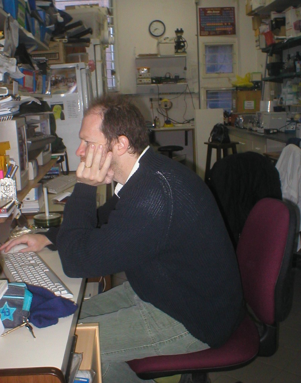 Diego Golombek en su laboratorio de Cronobiologia de la Universidad Nacional de Quilmes